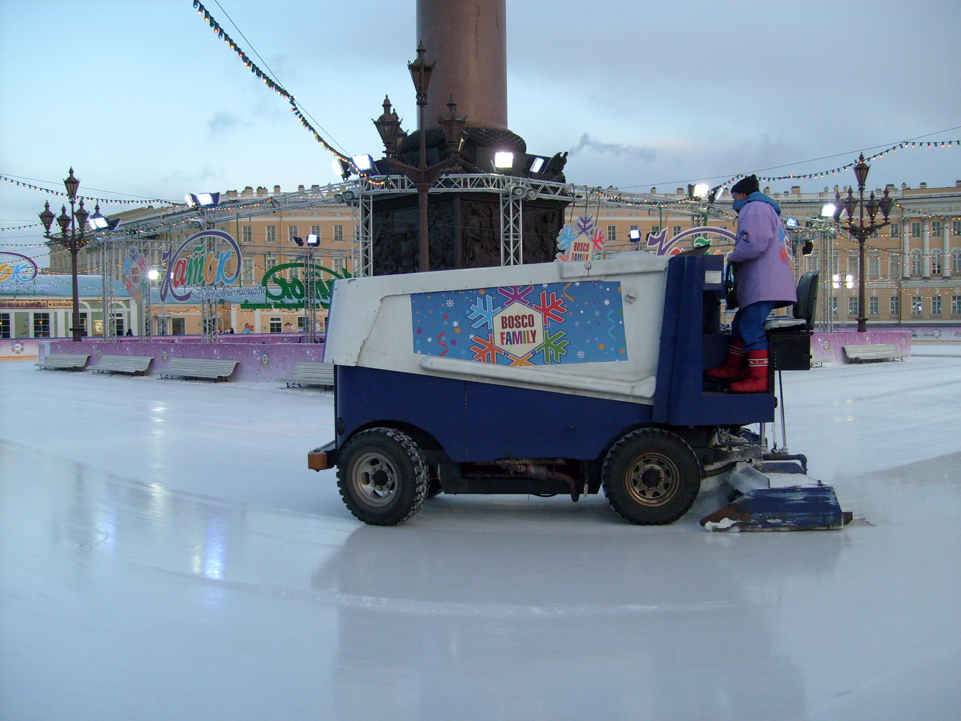 Каток на Дворцовой площади Петербурга, февраль 2008